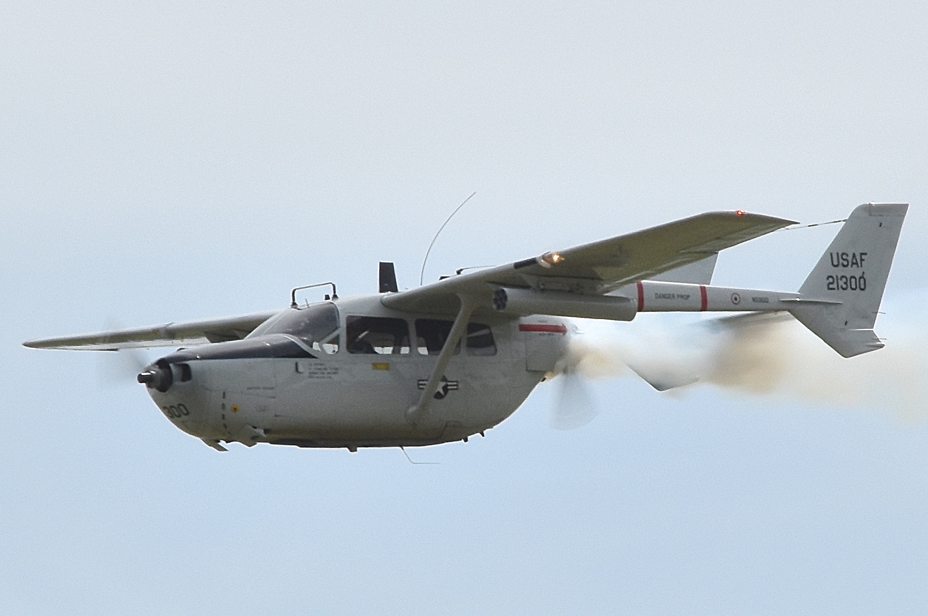 Texel Air Show 2015 De Cessna O-2A kent haar oorsprong in het midden van de Vietnam-oorlog, toen de Amerikaanse strijdkrachten een betrouwbaar en rugged toestel zochten voor Forward Air Control, het opsporen en markeren van gronddoelen voor de grote, snelle en hoogvliegende bommenwerpers. Tussen 1967 en 1970 produceerde Cessna in Wichita ruim vijfhonderd O-2's. Het exemplaar van de Stichting Postbellum (registratie N590D) is gebouwd in 1967 en heeft bijna drie jaar dienst gedaan in Vietnam onder registratie USAF 21-300, waarna ze terug werd gevlogen naar de Verenigde Staten. Bron